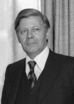 Bundeskanzler Helmut Schmidt, Helsinki 1975